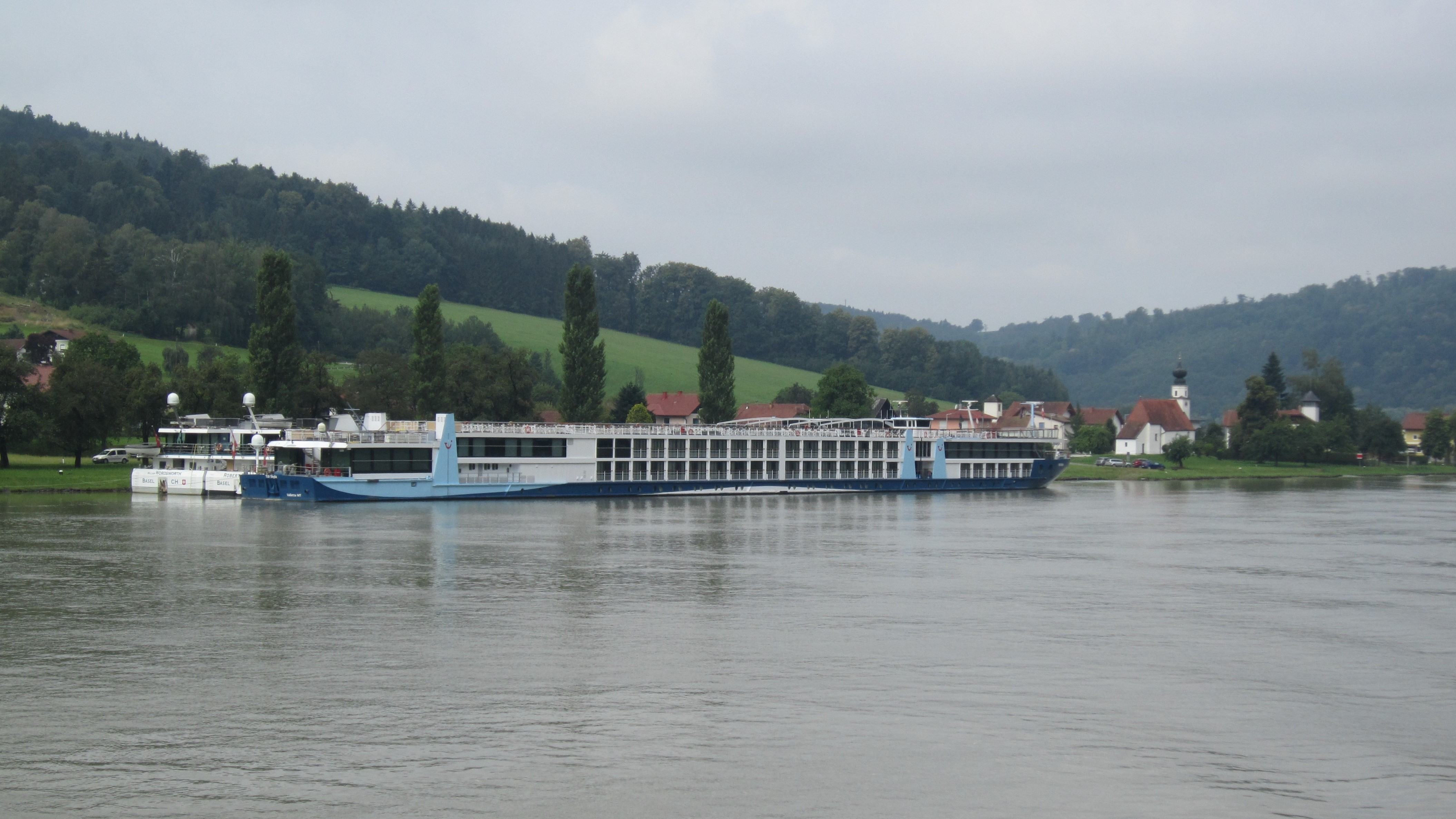 Aktuell wegen der COVID-19-Pandemie nicht benötigte Flusskreuzfahrtschiffe parken in der Donau bei Pyrawang (Bezirk Schärding / Oberösterreich)